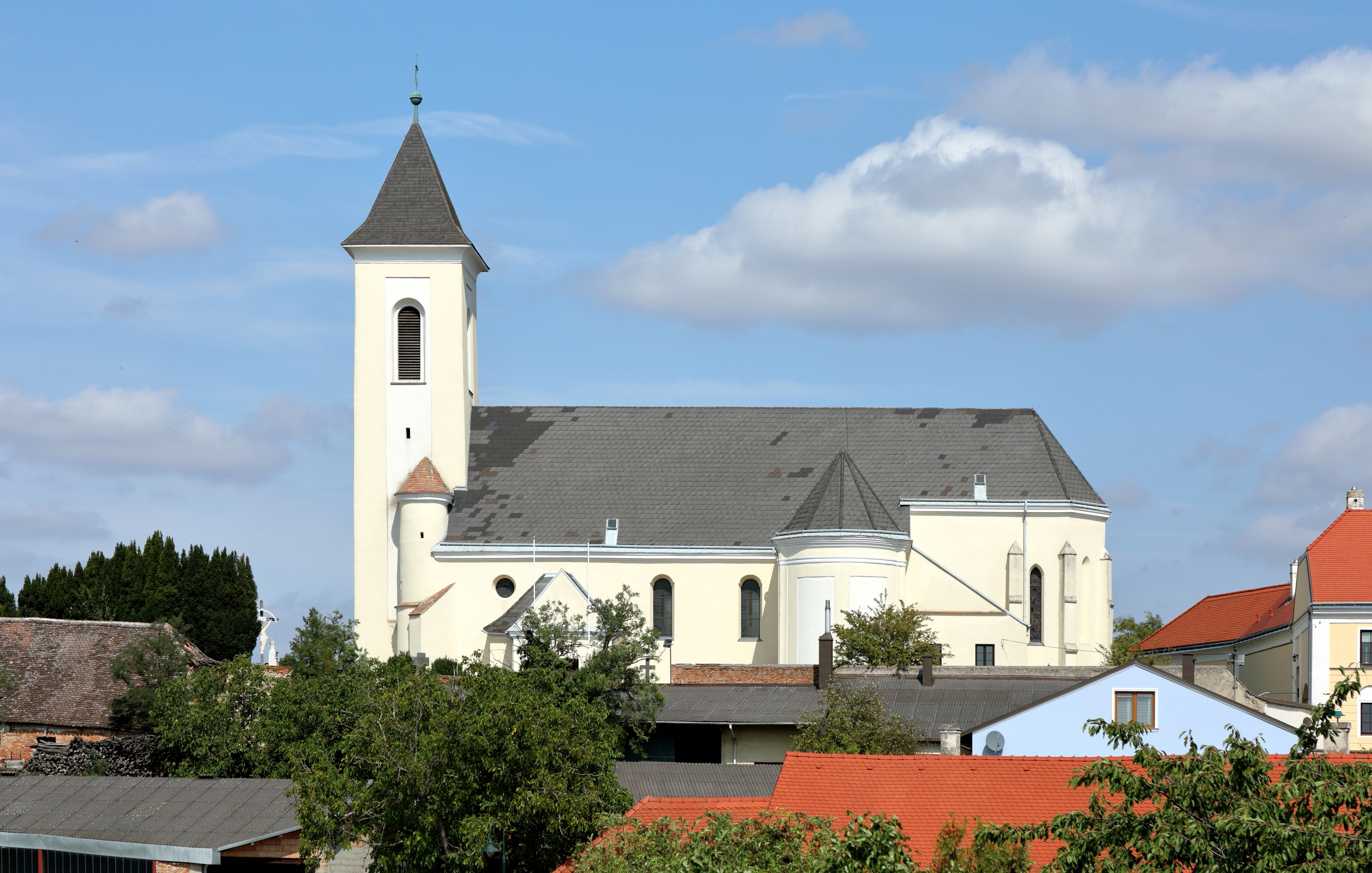 Südansicht der röm.-kath. Pfarrkirche hl. Stephanus in der niederösterreichischen Gemeinde Gaubitsch.Die in erhöhter Lage im Norden des Ortes errichtete Kirche hat ein romanisches Langhaus (13. Jahrhundert) mit gotischem Chor (14. Jahrhundert) und Westturm. Mitte des 18. Jahrhunderts erfolgten barocke Um- und Anbauten und der gotische Turm wurde im 19. Jahrhundert verändert.